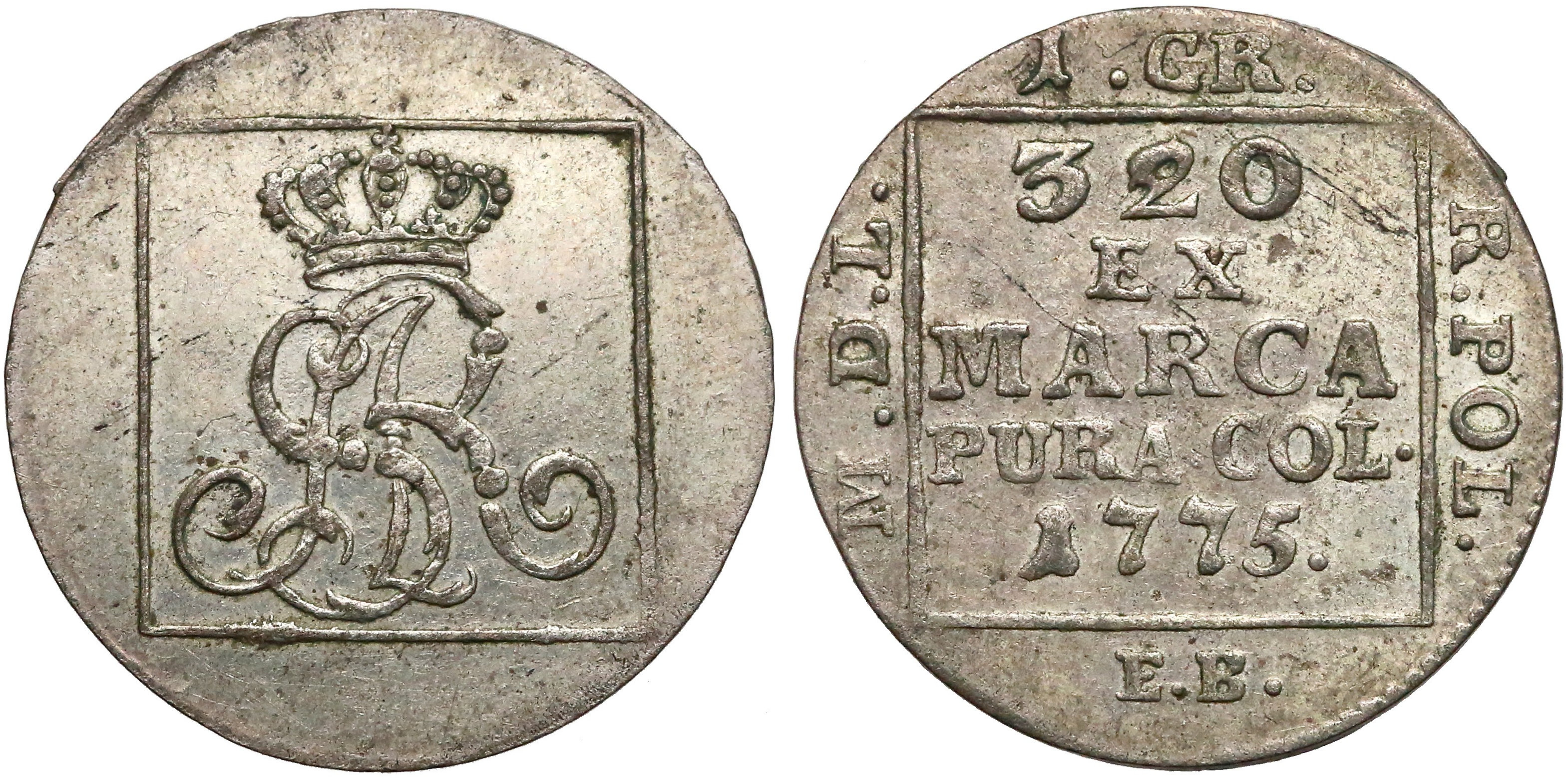 Grosz srebrny koronny 1775